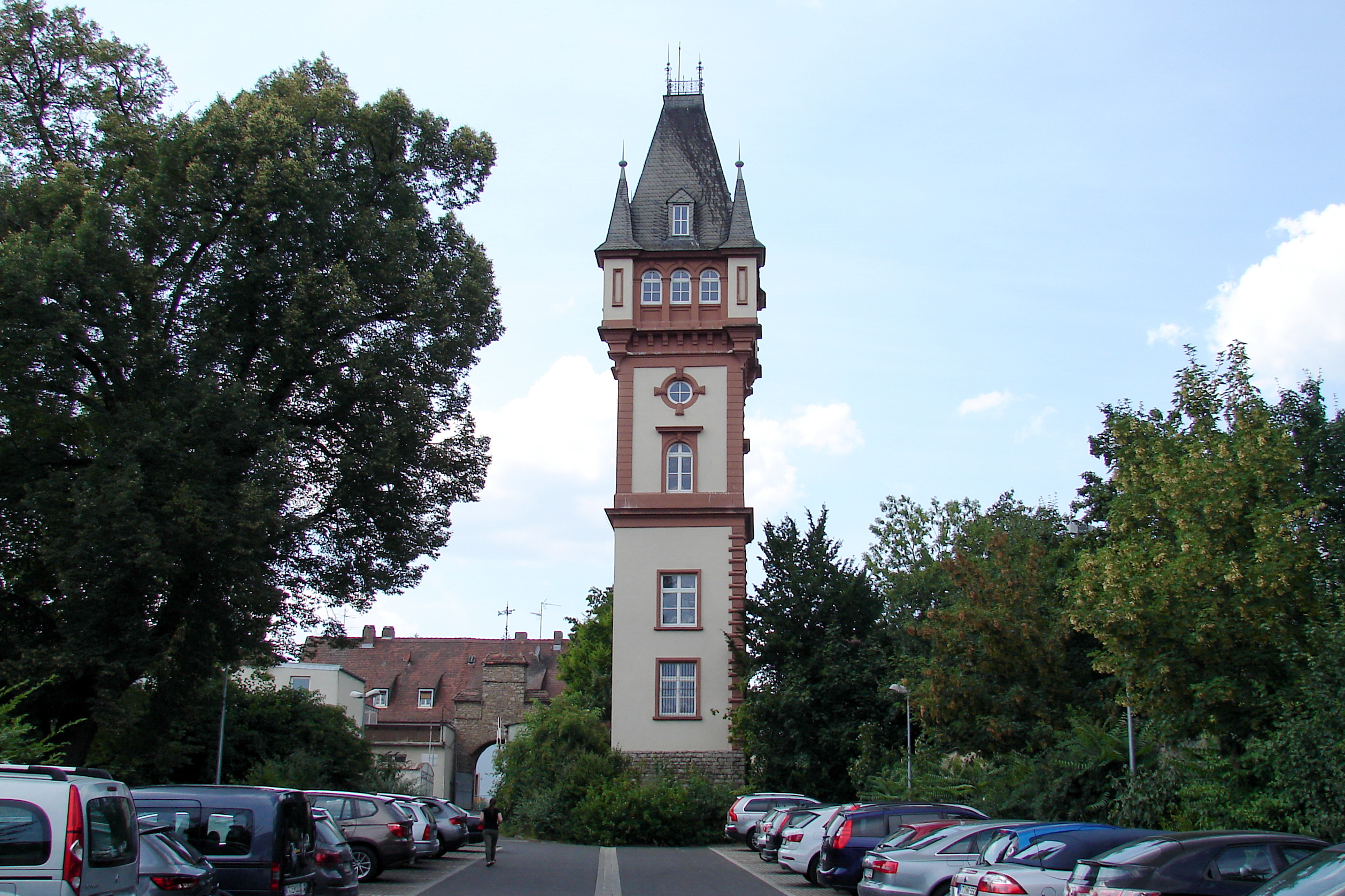 Turm des zerstörten Deuster-Schlosses, Ende 19. Jahrhundert; Portalbau